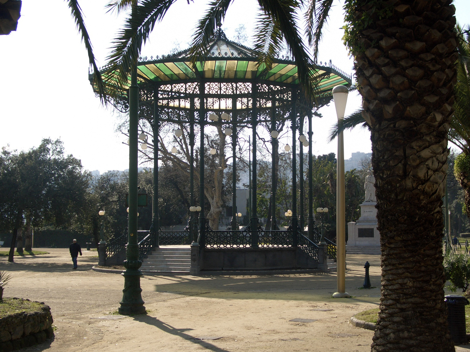 Napoli, Italia, Villa Comunale a Chiaia (già Villa Reale)9063_bandstand